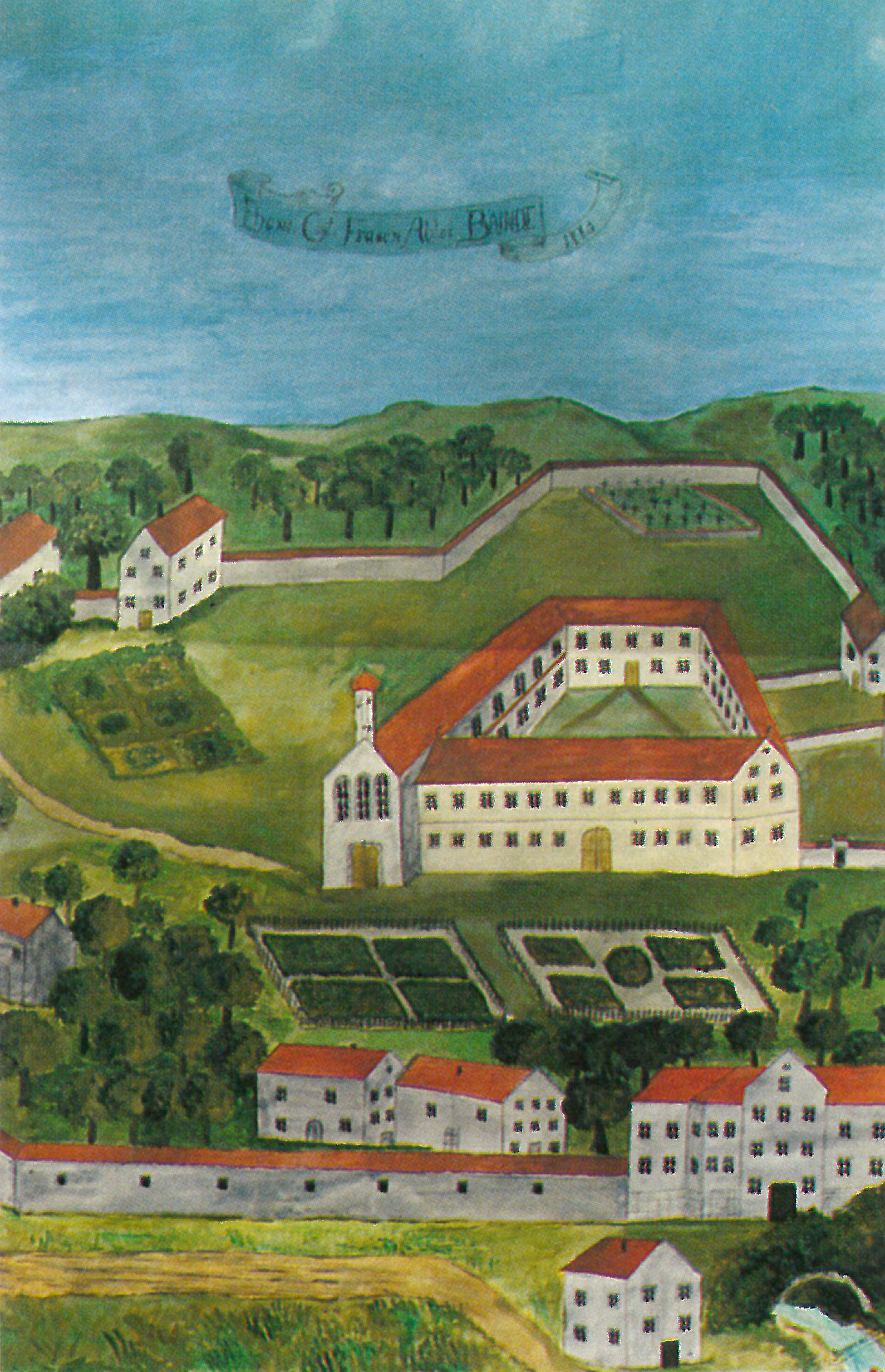 Reichsabtei Baindt 1773, späteres Aquarell von Leopold Korexl; das Gästehaus fehlt auf dem Bild